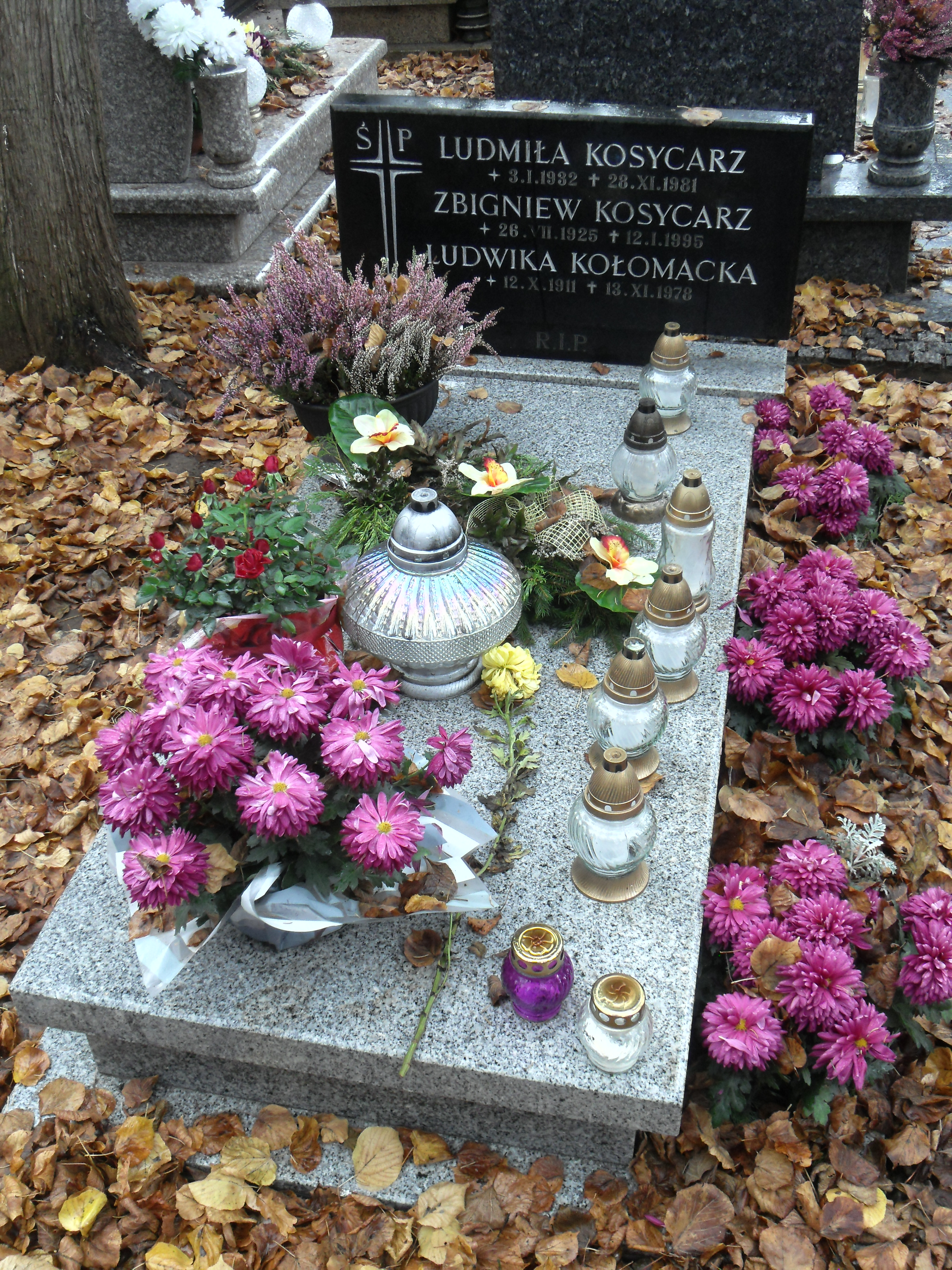 Gdańsk Oliwa. Cmentarz Oliwski, grób gdańskiego fotoreportera Zbigniewa Kosycarza (1925-1995).